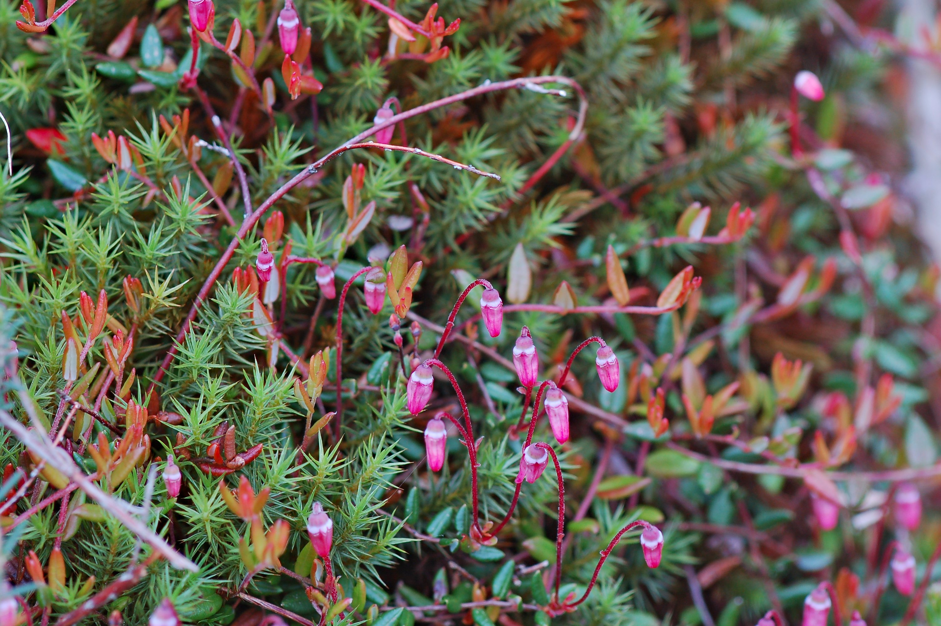 Gewöhnliche Moosbeere (Vaccinium oxycoccos) in den Hangmooren des Ebbegebirges (NSG „Auf’m Ebbe/Ebbemoore“, Märkischer Kreis, NRW)